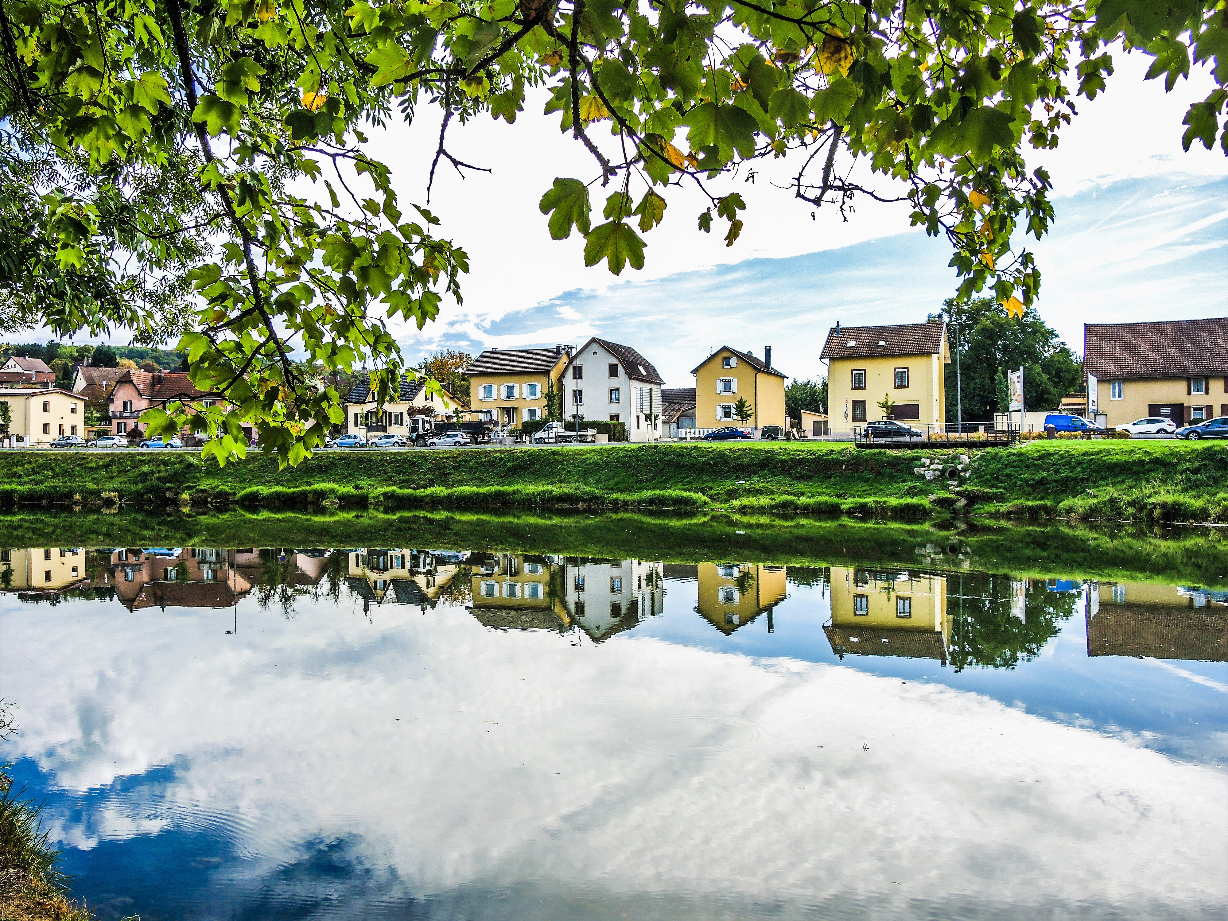 Derrière la rivière Doubs, au premier plan, le village de Voujeaucourt, vu du parc de loisirs. Doubs